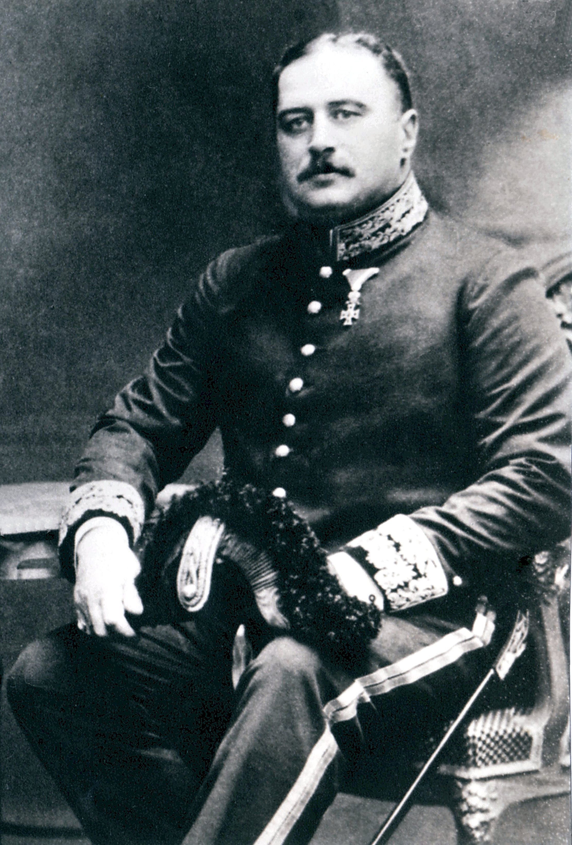 Georg Wassilko von Serecki um 1905